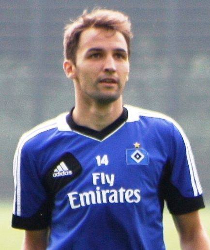 Milan Badelj beim HSV-Training am 25. Juli 2013.